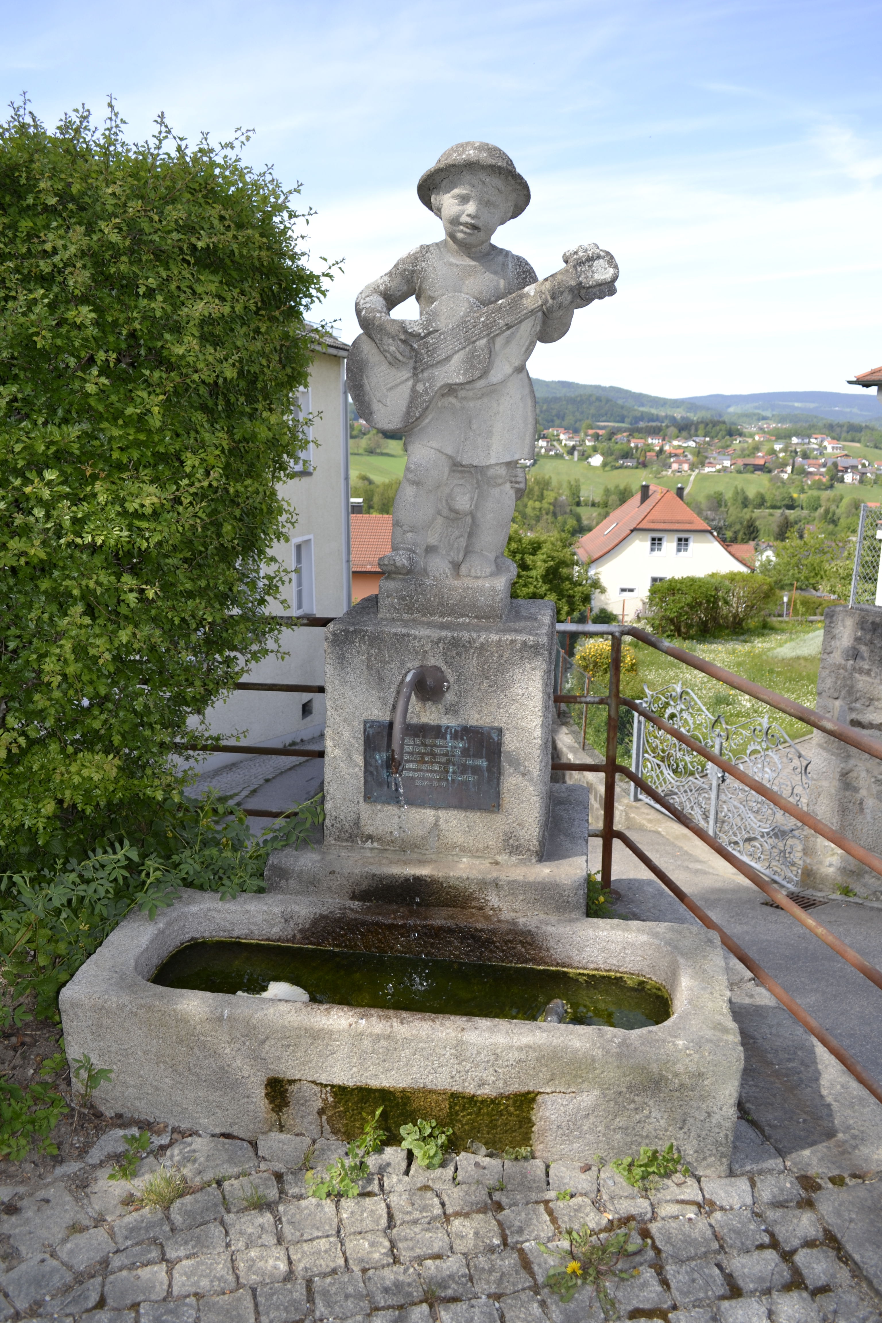 Ein Brunnen in Waldkirchen gestiftet von dem Nationalsozialisten Ludwig Liebl.